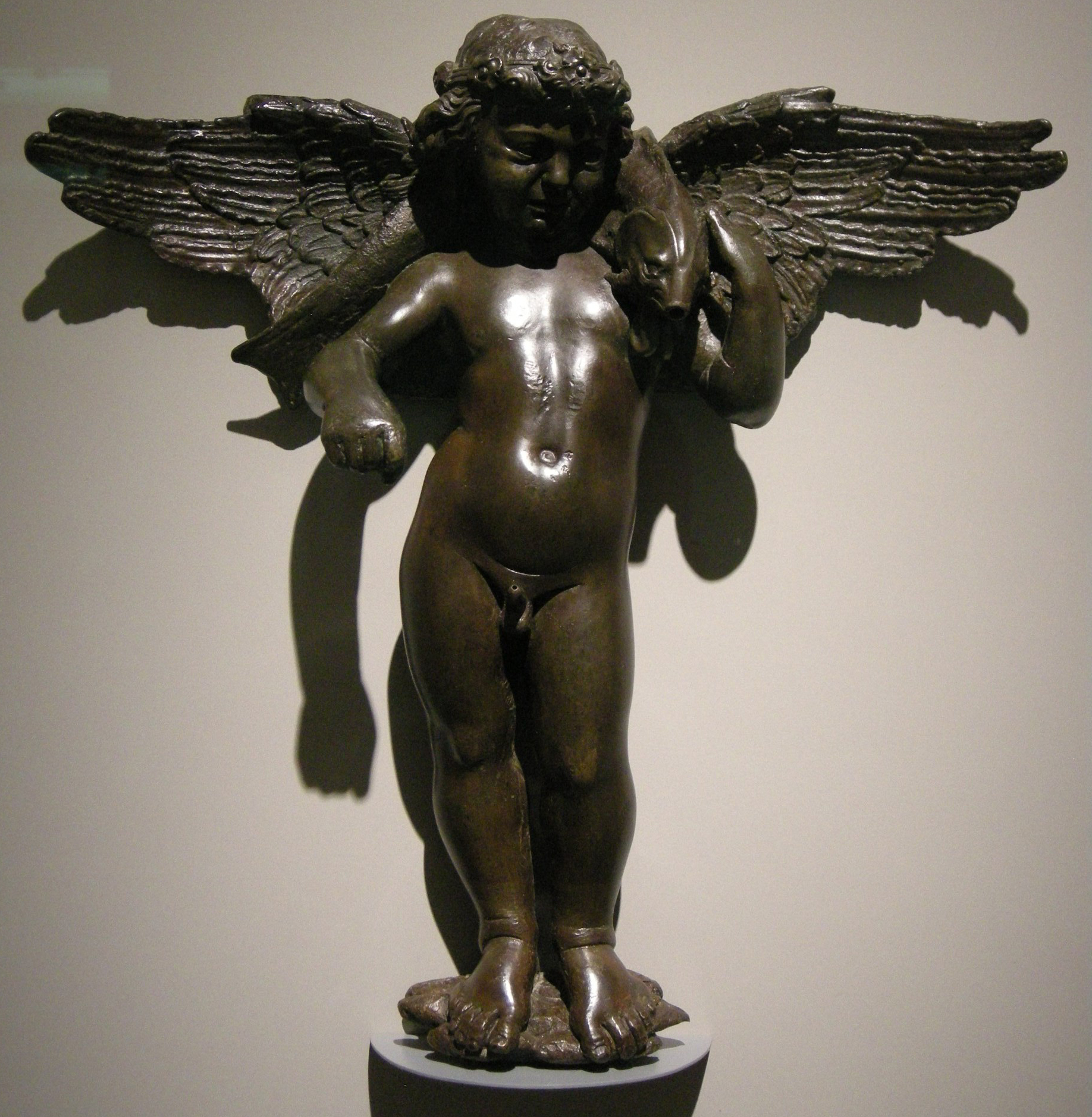 Donatello, putto alato con pesce, 1435-40 ca.